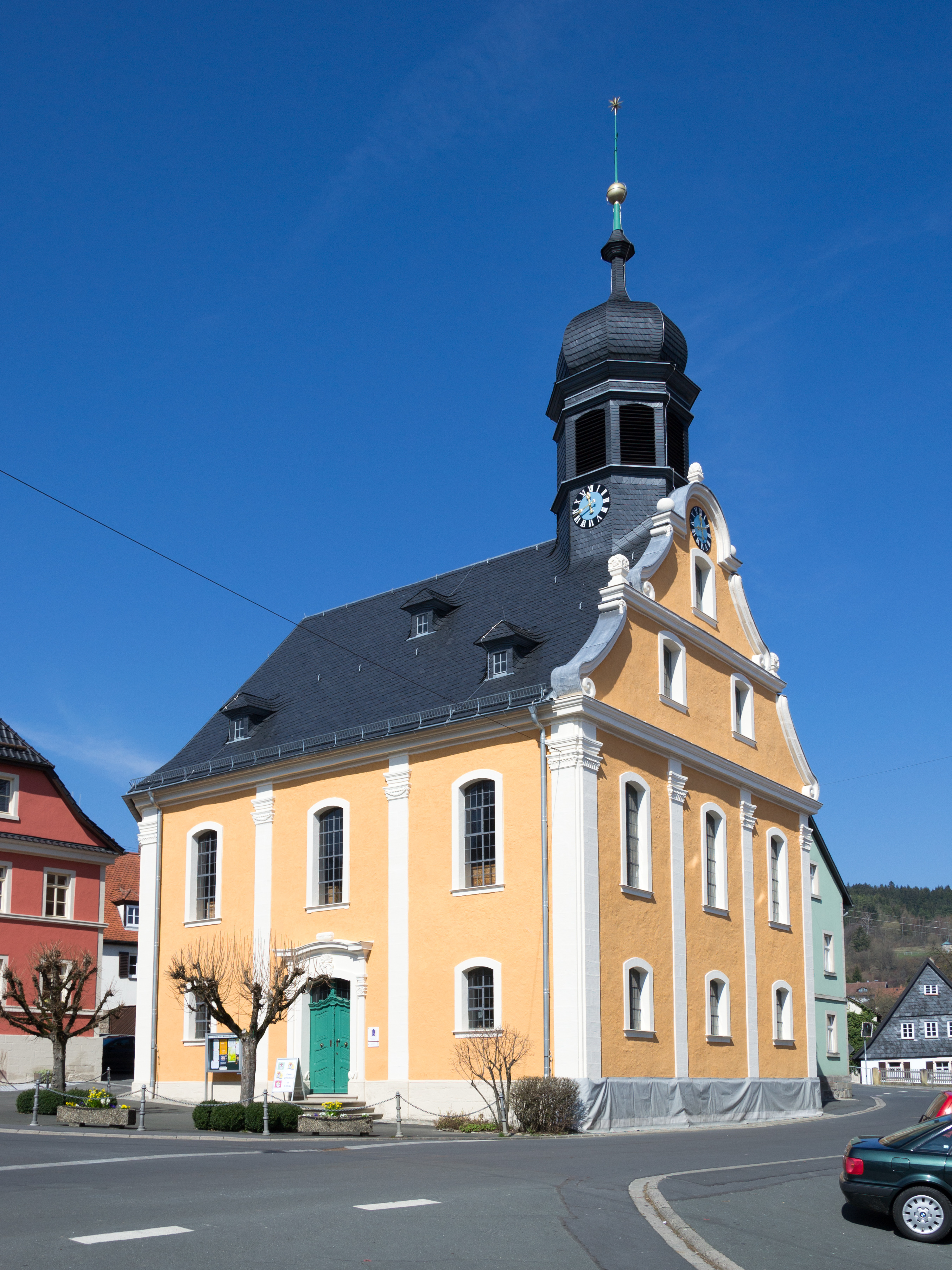 Michaeliskirche in Unterrodach